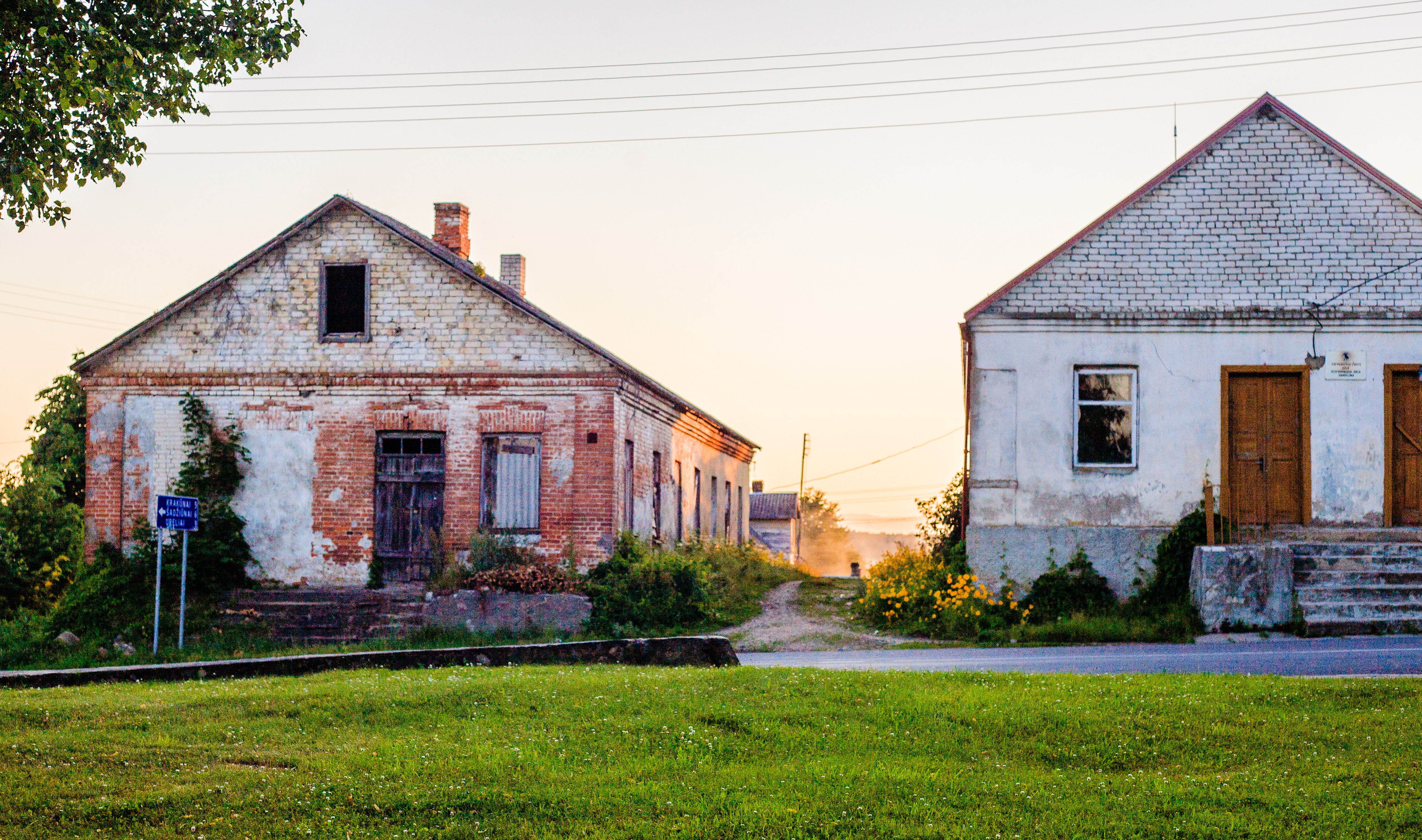 Mūriniai pastatai Dieveniškių senamiestyje